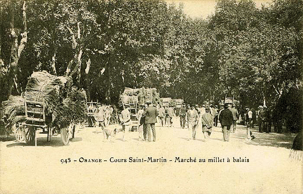 Marché au millet à balais à Orange au début du XXe siècle